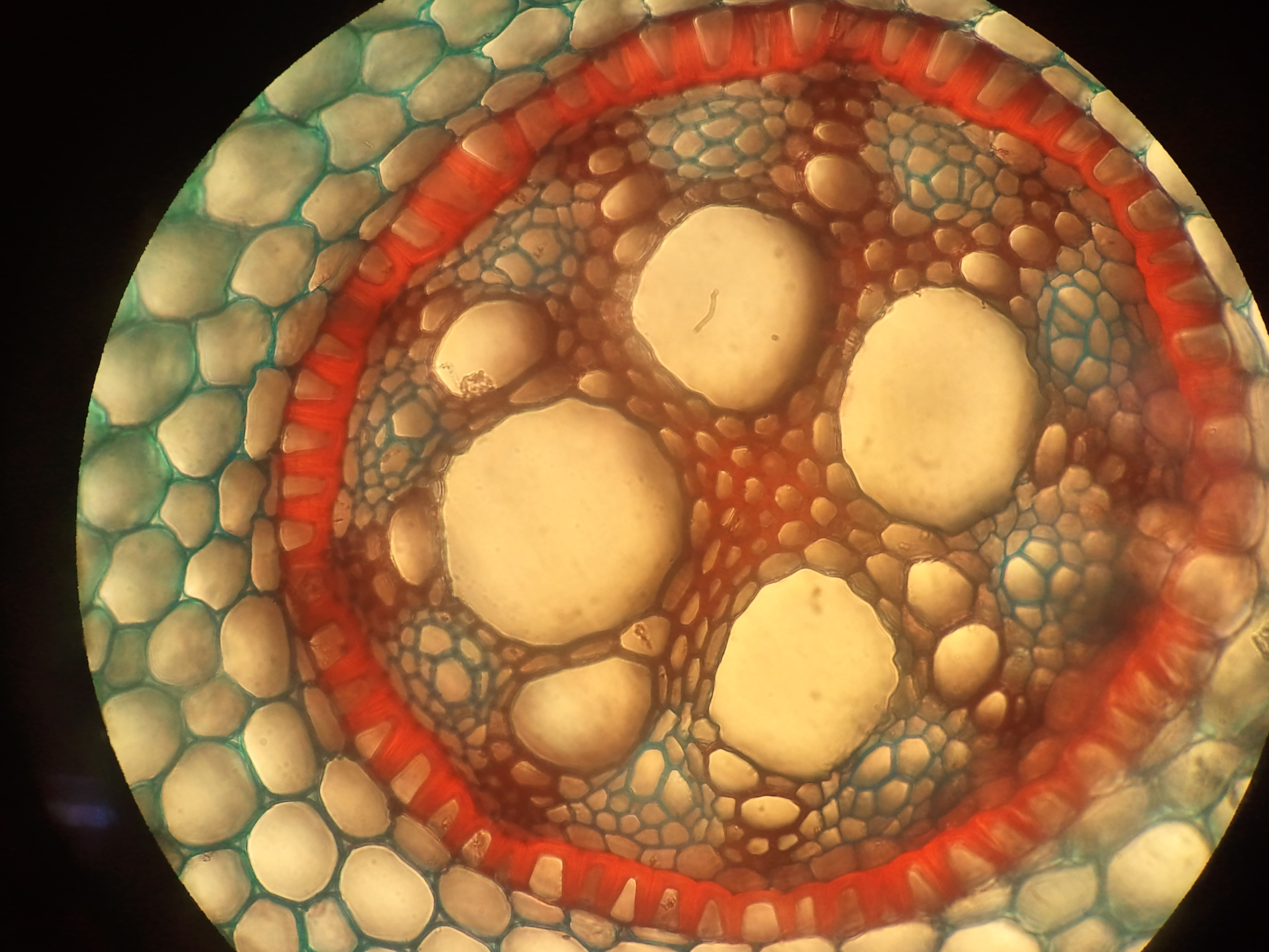 Iris germanicae, Wurzelquerschnitt gefärbt mit Astrablau und Safranin Im Bild von außen: Wurzelrinde (blau), Endodermis mit Durchlasszellen (roter ring), und radiäres Leitbündel mit Innenxylem (rot, große "Löcher") sowie dem Phloem (blau)